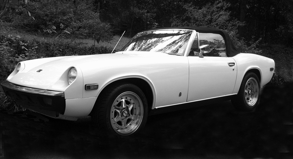 1973 Jensen-Healey